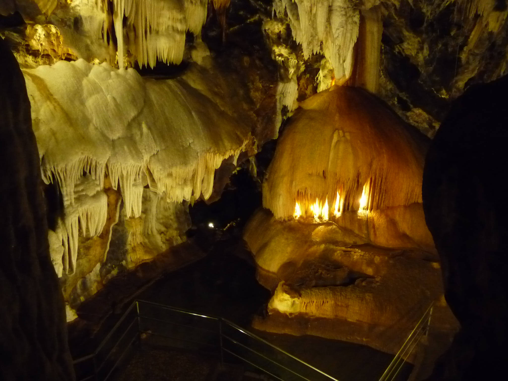 GrutaDeLasMaravillas-Aracena-P1040610.JPG